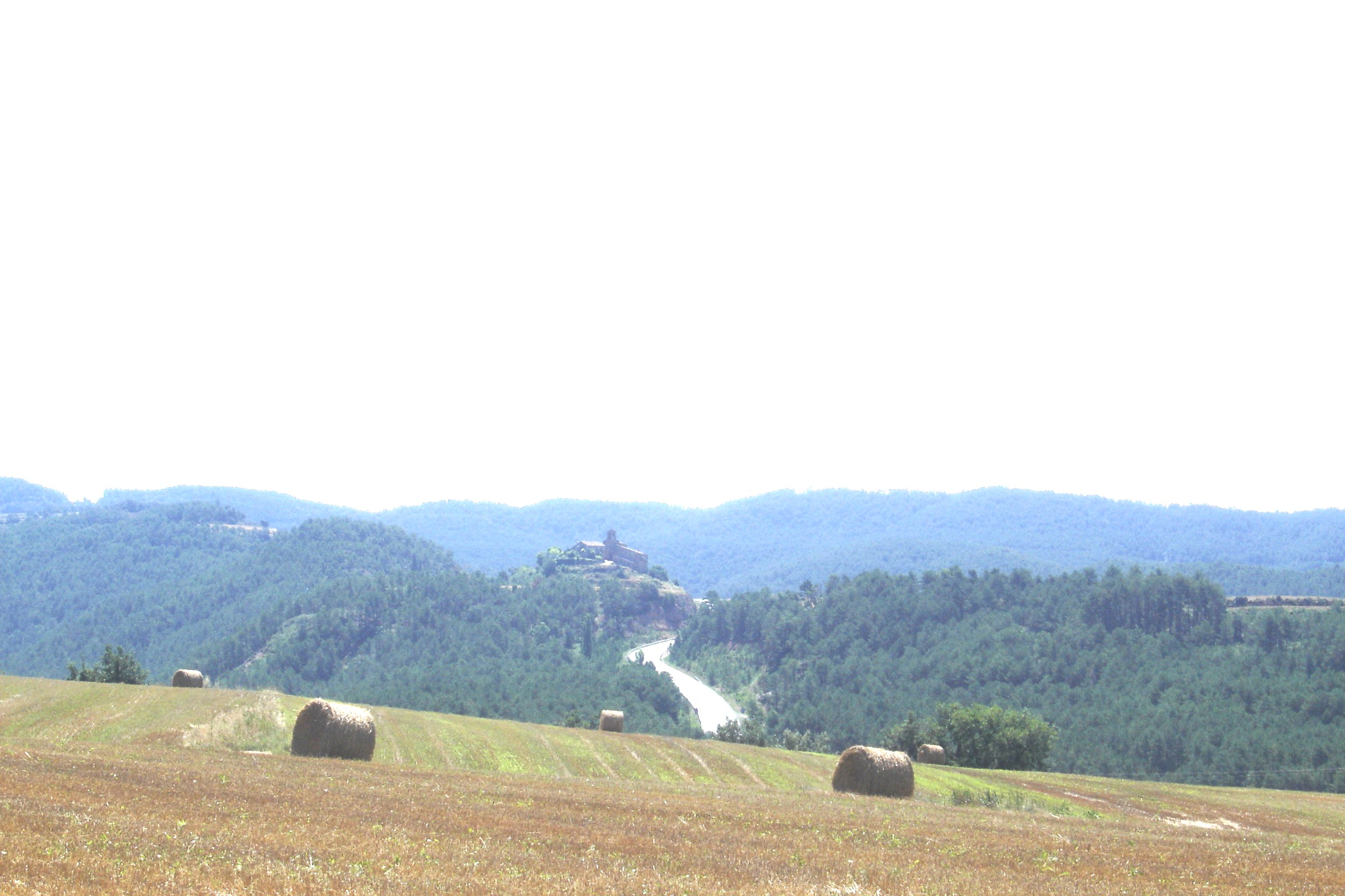 El nucli de Castellar de la Ribera (Solsonès) vist des de l'oest.